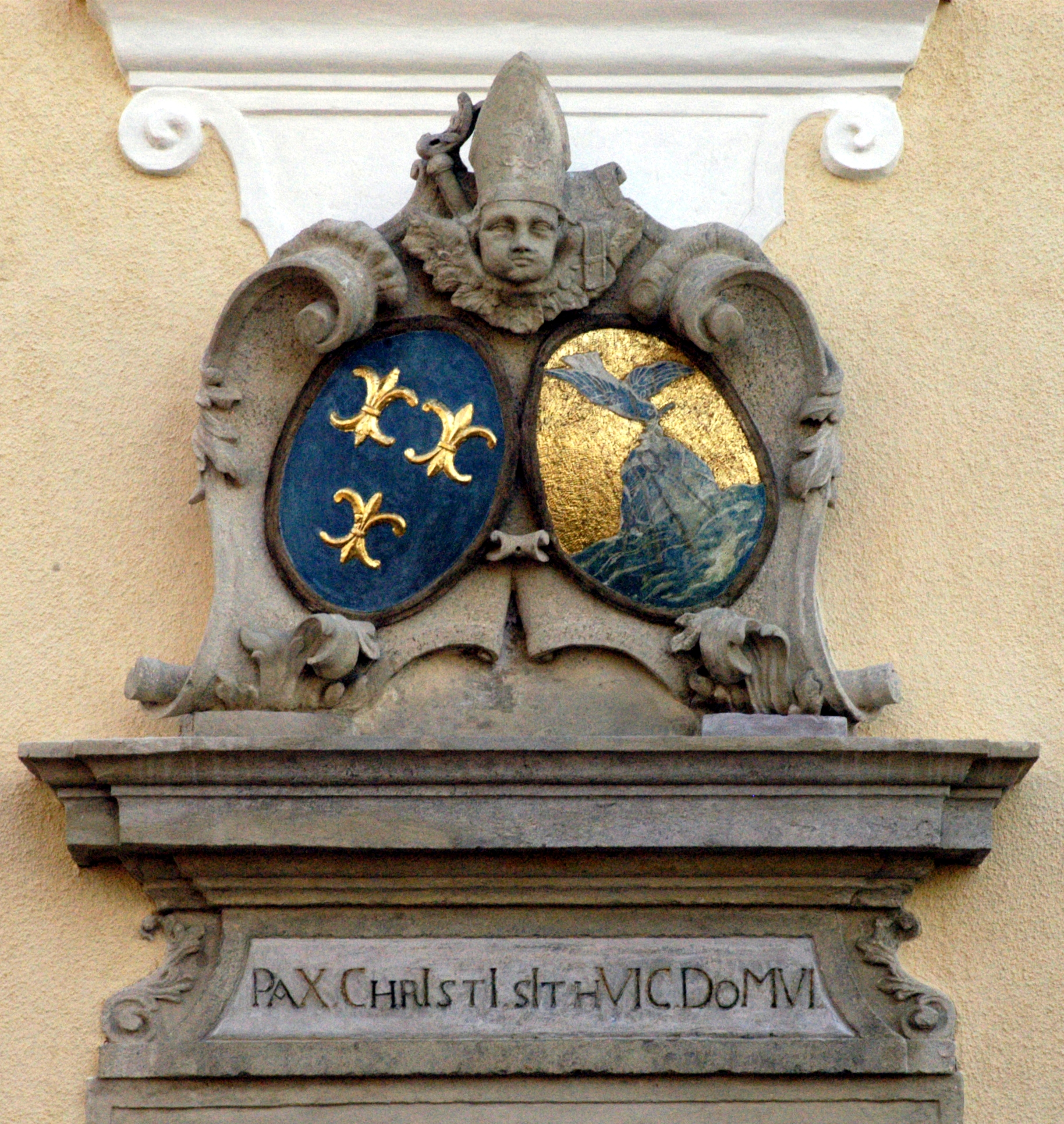 Pfarrhof in Radlbrunn, Gemeinde Ziersdorf - Wappenkartusche (Abt Chrysostomus Wieser, Stift Lilienfeld) mit Chronogramm (1725) über dem Portal an der Nordfassade